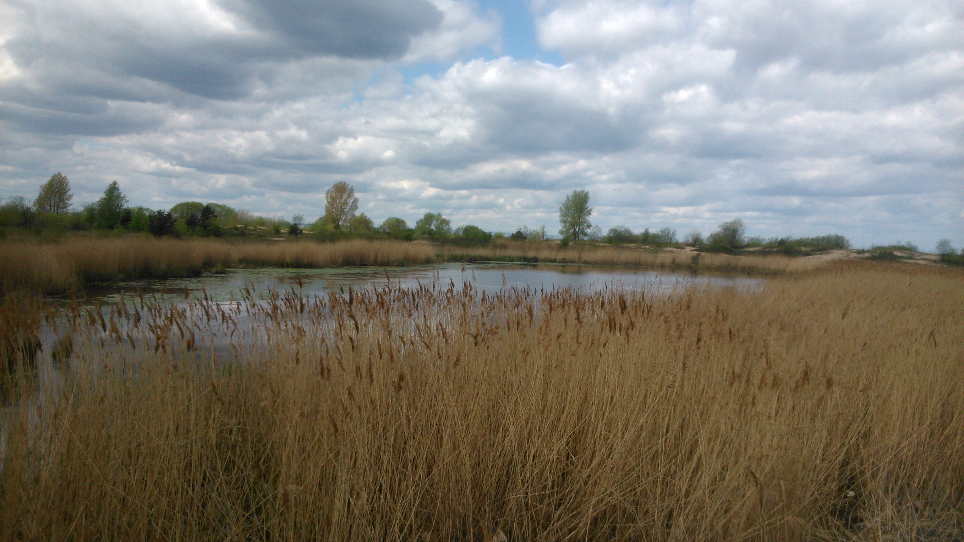 Obszar specjalnej ochrony ptaków Ujście Wisły (strona gdańska). This is a photography of Natura 2000 protected area with ID PLB220004